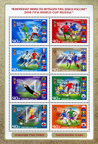 Малый лист «Чемпионат мира по футболу FIFA 2018 в России™. Команды-участники».